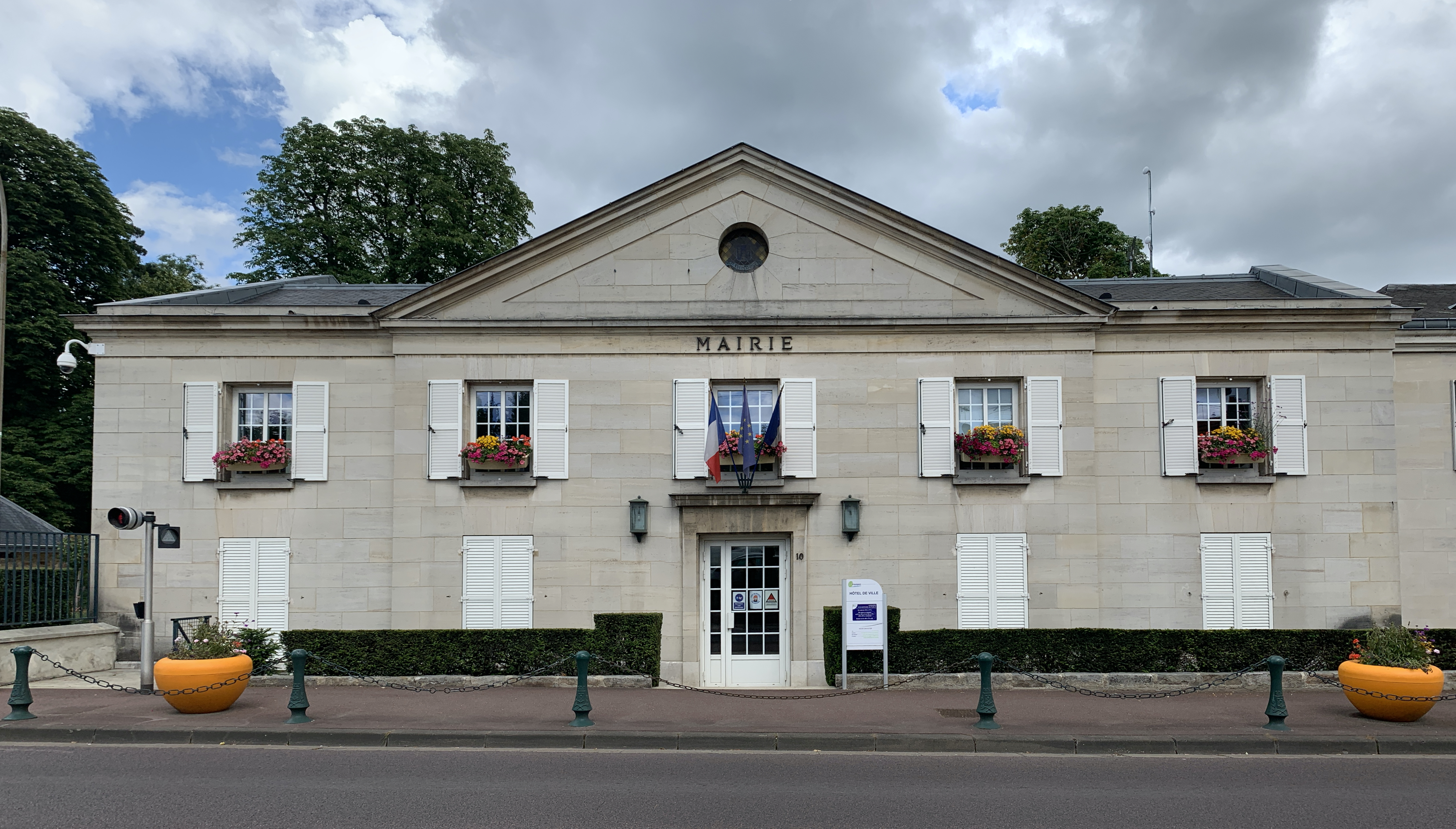 Hôtel de ville d'Ormesson-sur-Marne.